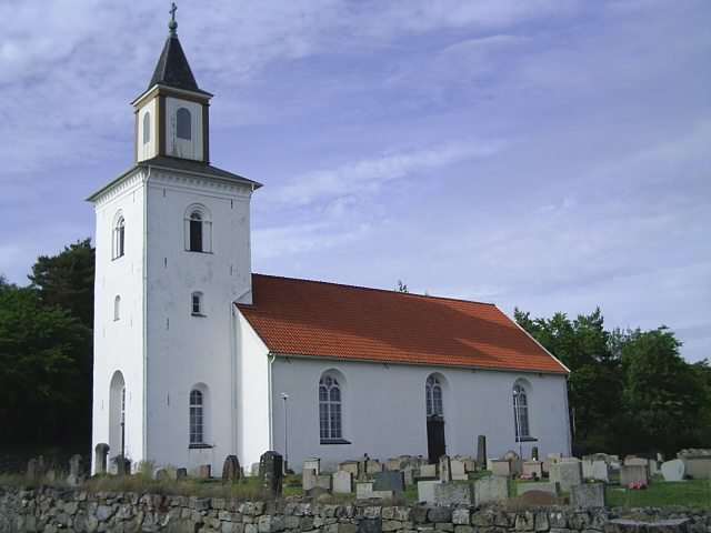 Tjärnö kyrka, Tjärnö församling, Strömstads kommun by Tubaist, sommaren 2005